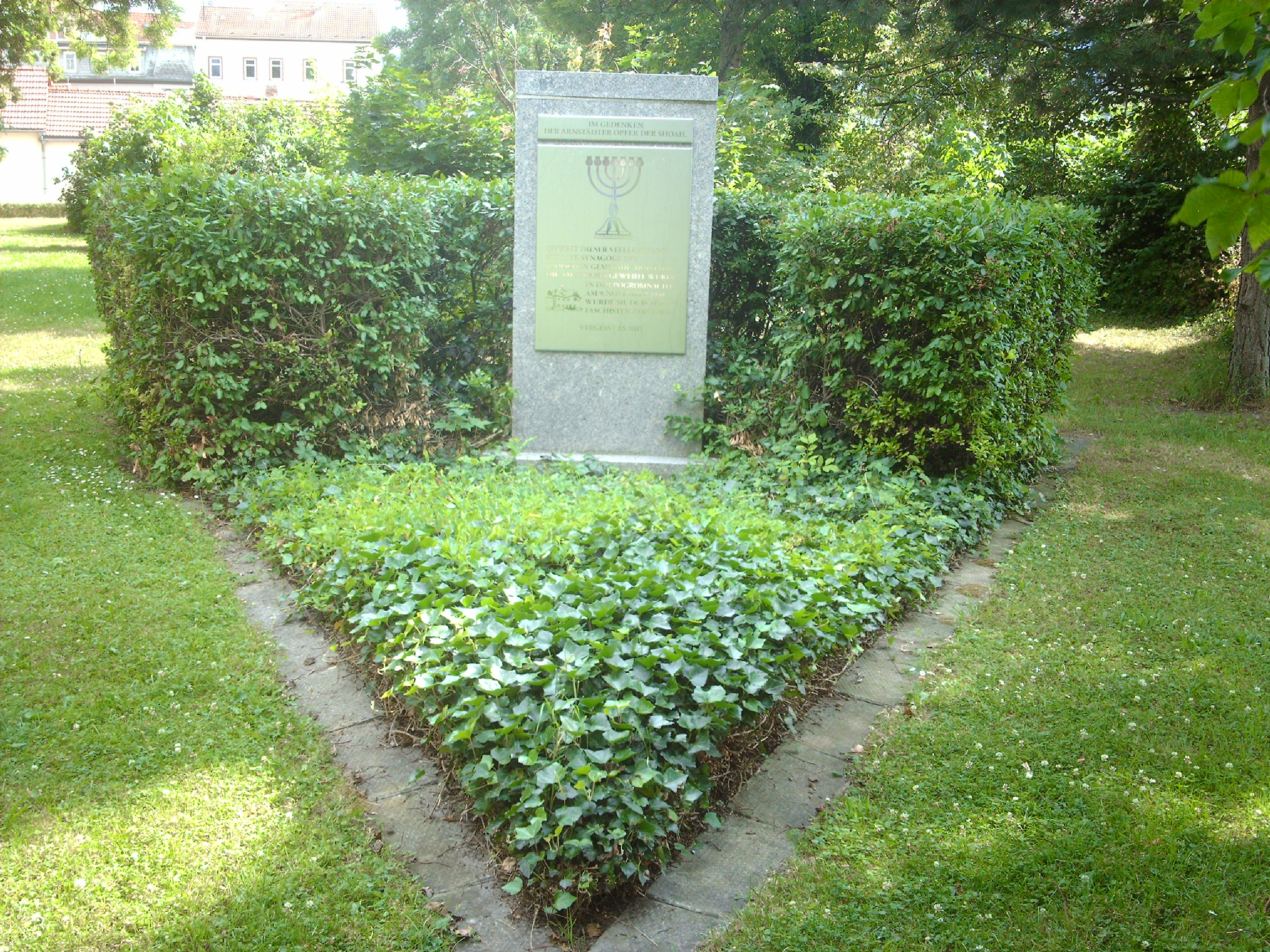 Denkmal für die 1938 zerstörte Synagoge von Arnstadt auf dem Alten Friedhof